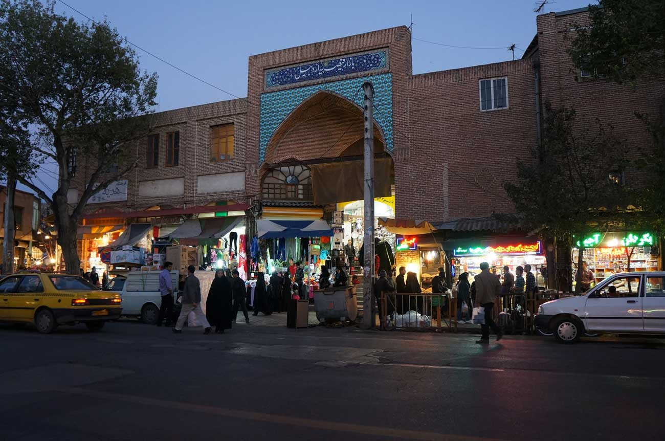 Ardabil, Iran 2013